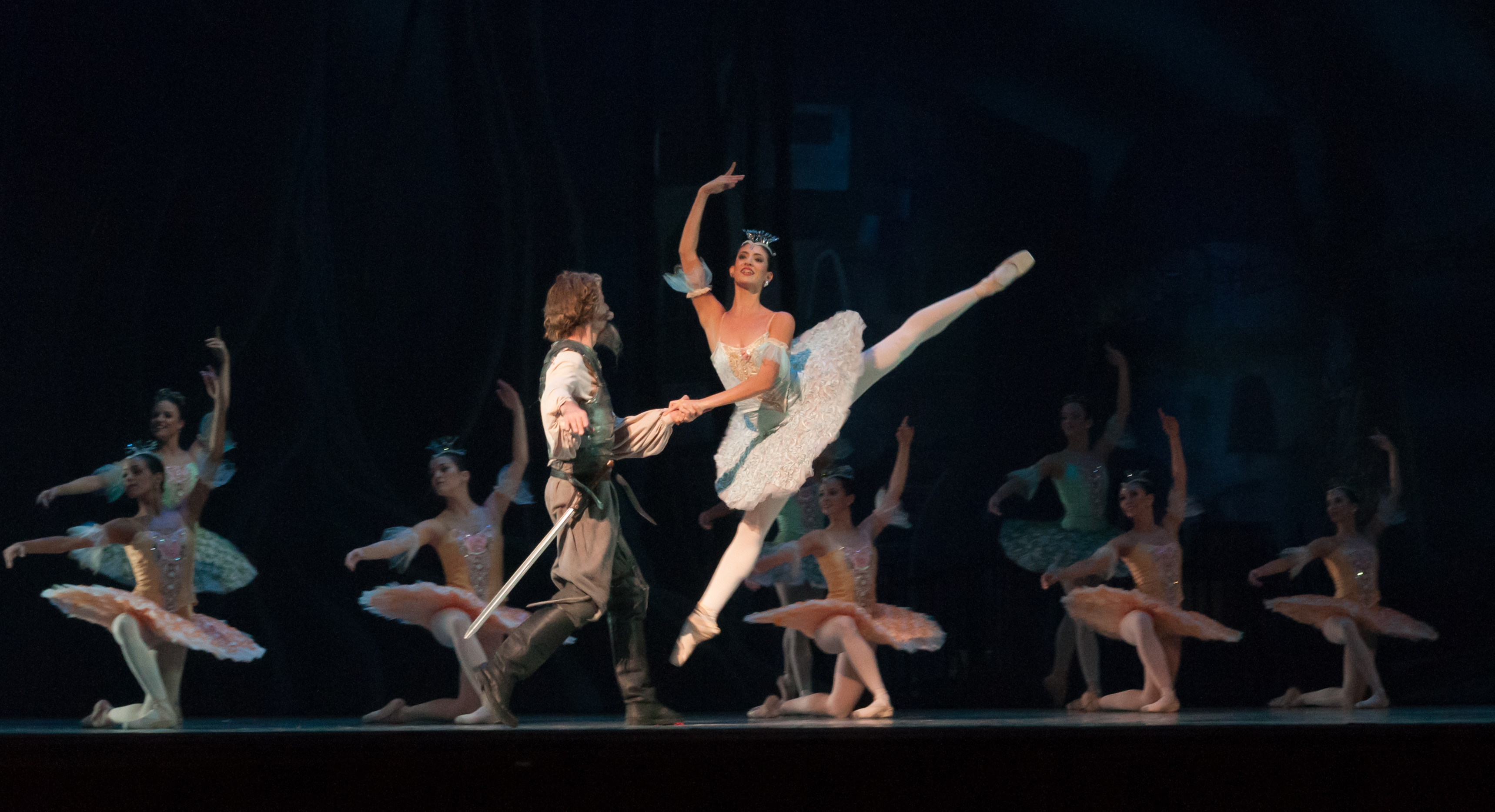 Don Quijote. Música: Ludwig Minkus. Coreografía: Laura Fiorucci basada en la original de Marius Petipa. Andrea Hernández y Fred Bordeinu con el Ballet Teresa Carreño. Teatro Teresa Carreño. Venezuela, 18 de octubre de 2013.